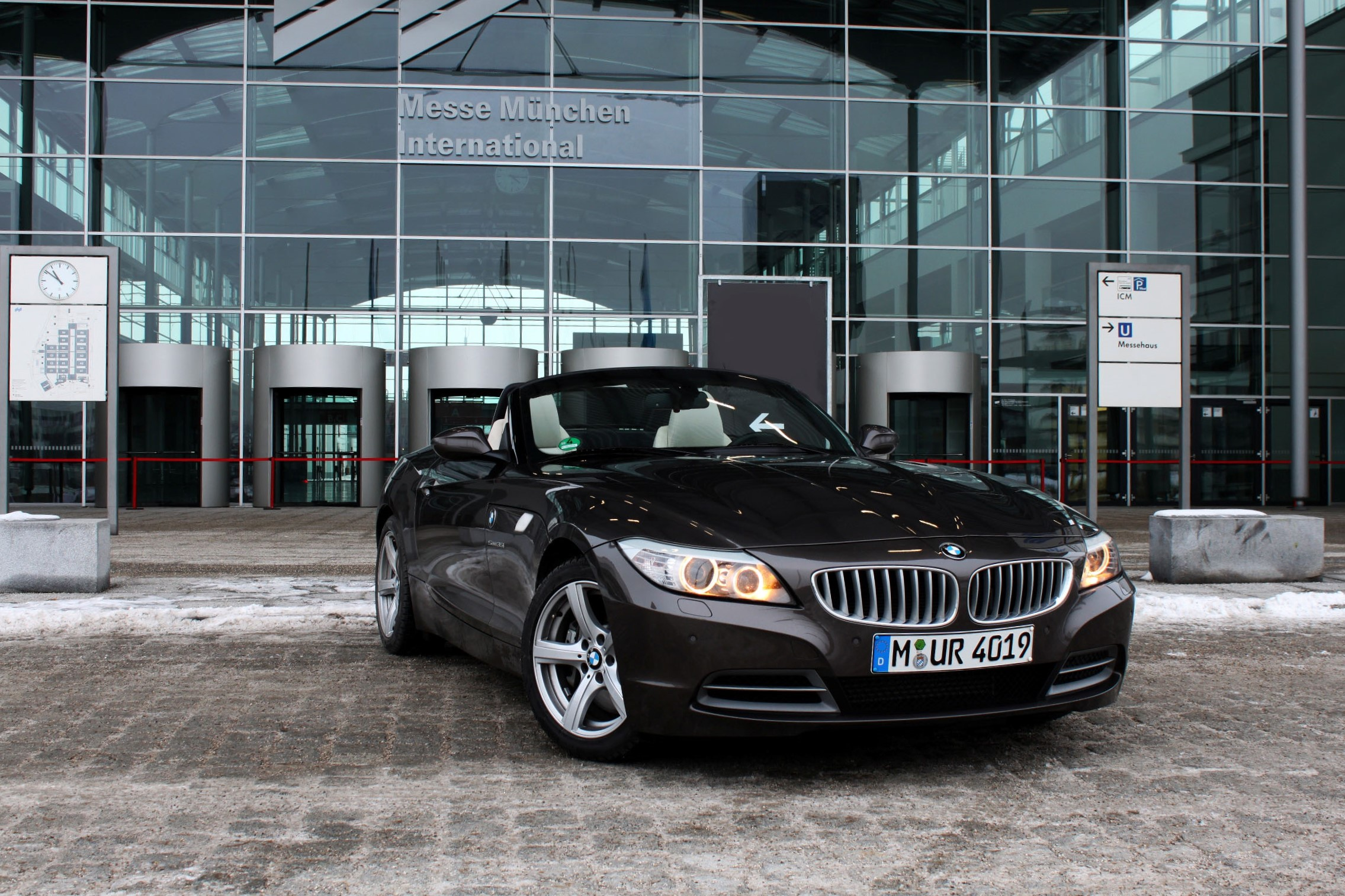 BMW Z4 E89 35i iDrive Design Pure White mit offenem Verdeck